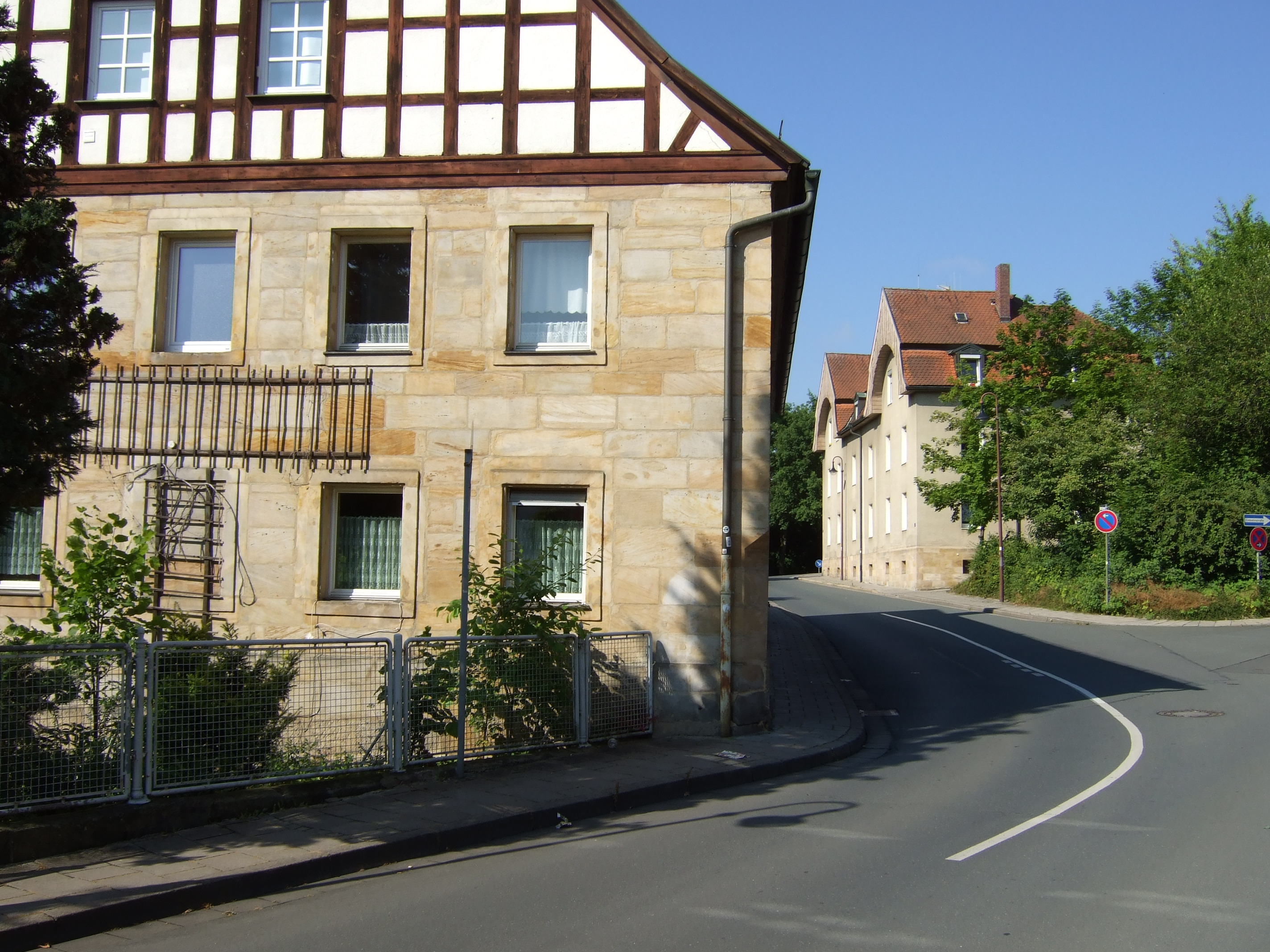 Steinmühle Bayreuth